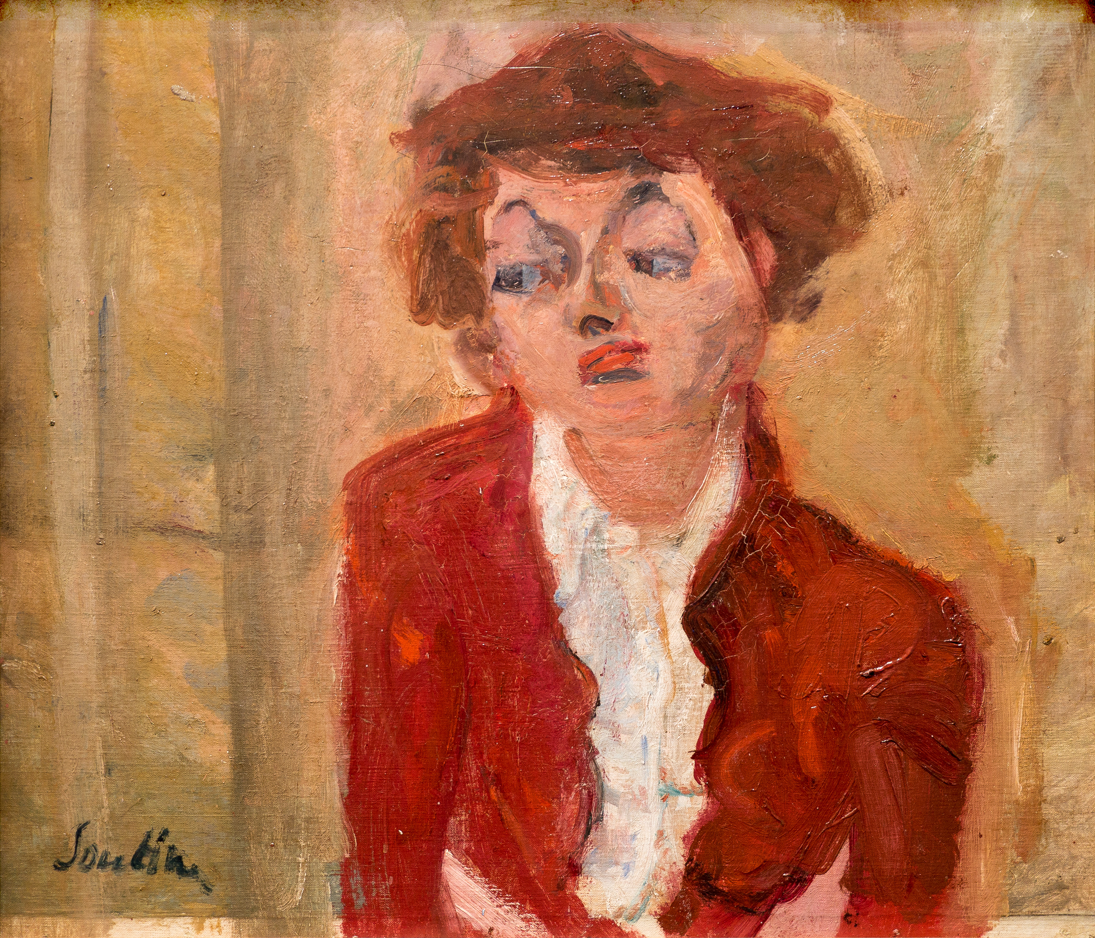 Chaïm Soutine (1893 - 1943), "La Jeune Anglaise", huile sur toile, vers 1934, Coll. Jean Walter et Paul Guillaume, Musée de l'Orangerie, Paris